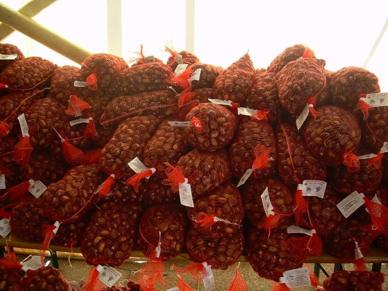 Marrone_SanZeno